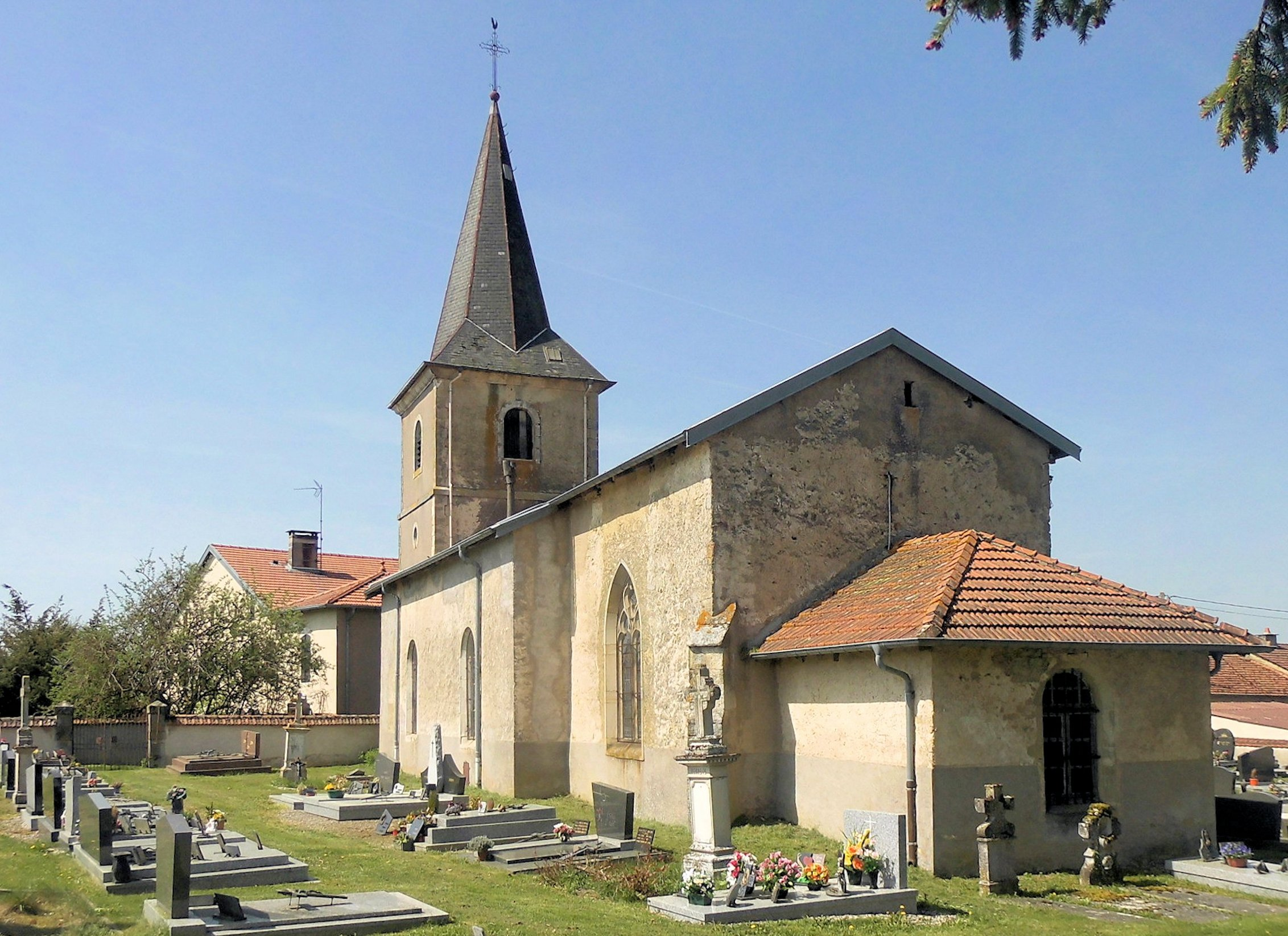 L'église Saint-Remy de Totainville